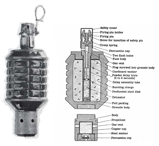 Japanese Type 91 50 mm grenade.